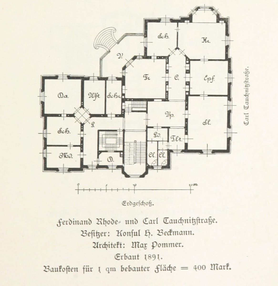 Villa Beckmann in der Karl-Tauchnitz-Straße in Leipzig, an der Einmündung der Ferdinand-Rhode-Straße. Offensichtlich Karl-Tauchnitz-Straße 10, also Standort der modernistischen Dependance der Galerie für zeitgenössische Kunst. - Grundriss Erdgeschoss.